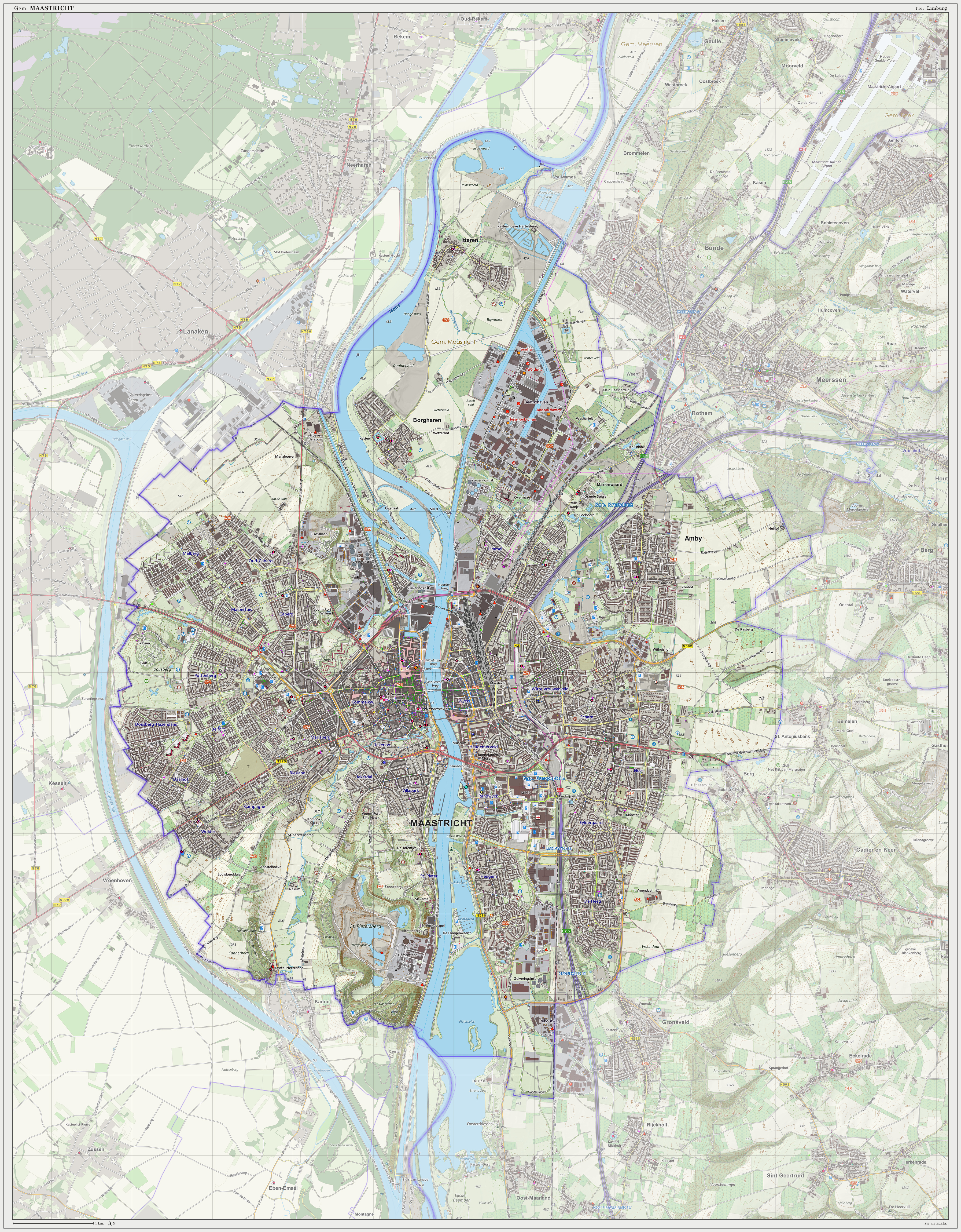 Topografische kaart van (gemeente) per maart 2014. Resolutie: 300 pixels/km. Kaartbeeld samengesteld uit de open geodata van de Top10NL en Top25namen (Basisregistratie Topografie, Kadaster 28-feb-2014), Creative Commons BY licentie. Gebouwvlakken uit open geodata BAG extract (8-mrt-2014). Wegen uit de OpenStreetMap (8-mrt-2014), OpenStreetMap community. Schaduwreliëf uit de Actuele Hoogtekaart AHN2 (8-mrt-2014). Samenstelling en kleurenschema: Jan-Willem van Aalst, met QGIS2. Zie ook de Legenda.